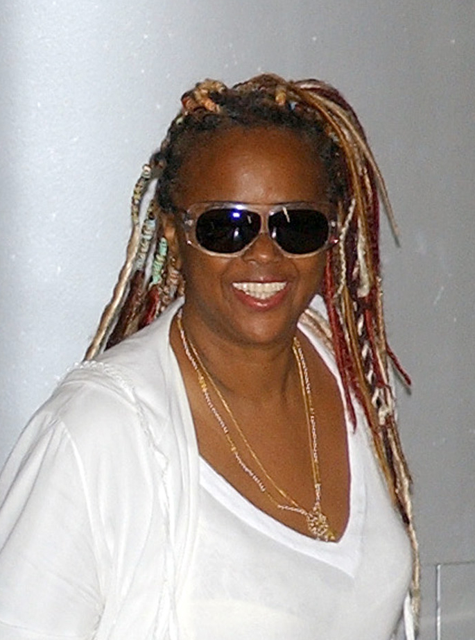 A cantora brasileira Sandra de Sá.